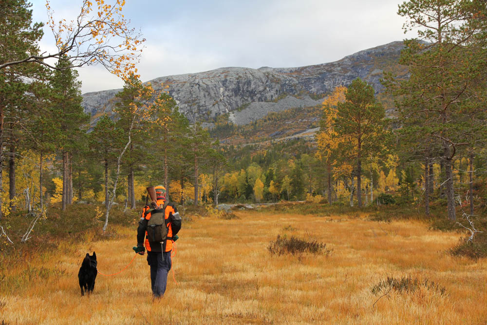 Elgjakt hos Plahtes Eiendommer